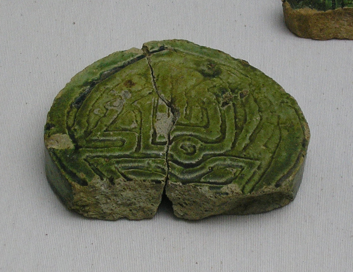 Estelas meriníes Estela funeraria meriní, correspondiente al siglo XIII y localizada en el cementerio árabe del Fuerte de Santiago, depositada en el museo municipal de Algeciras. Fotografia realizada en abril de 2008 para wikimedia.